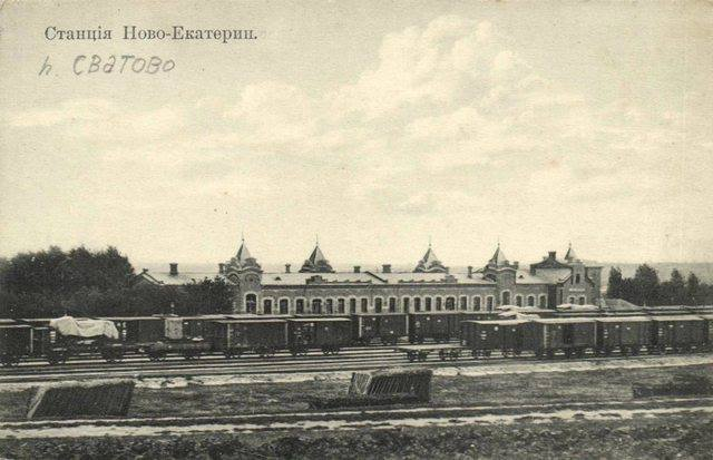 Дореволюционное Сватово